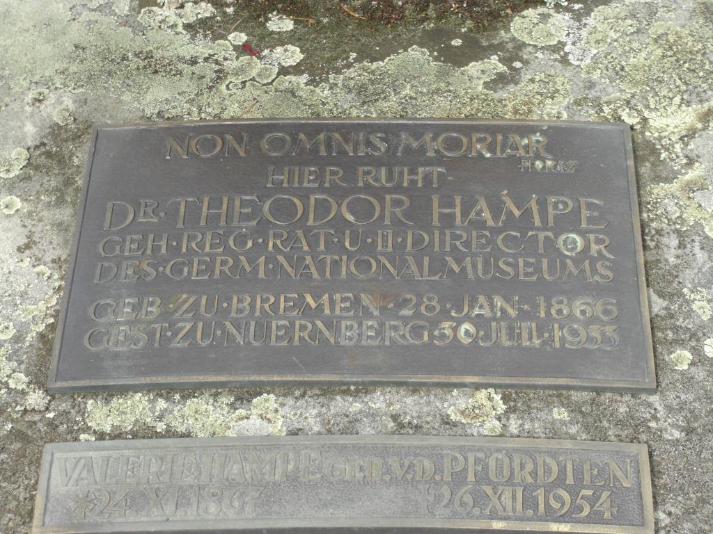 Grab des Germanisten und Kunsthistorikers Theodor Hampe (1866-1933) auf dem Nürnberger Friedhof St. Johannis.